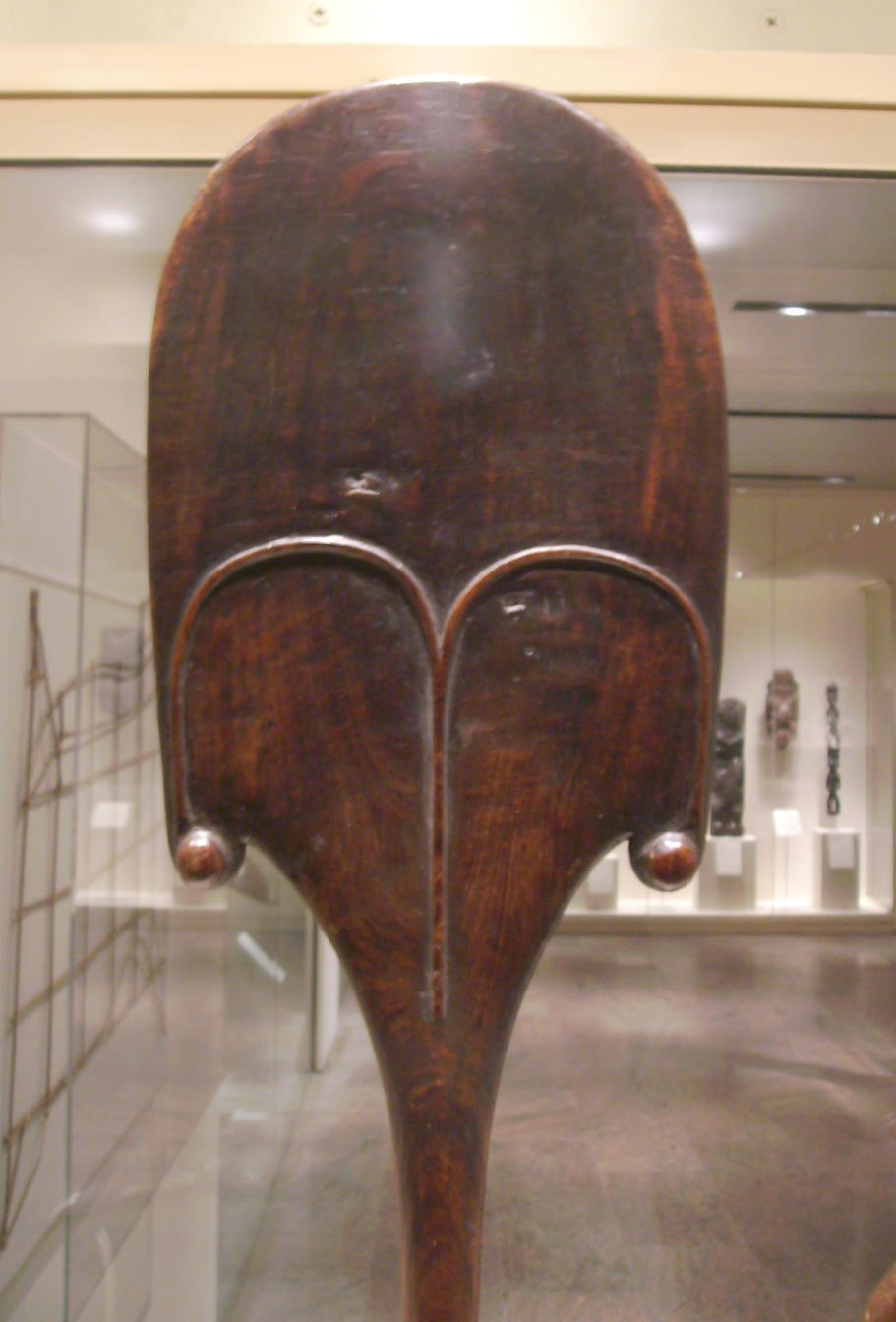 Oberes Blatt eines Rapa-Tanzpaddels der Osterinsel-Kultur mit stark stilisiertem Gesicht